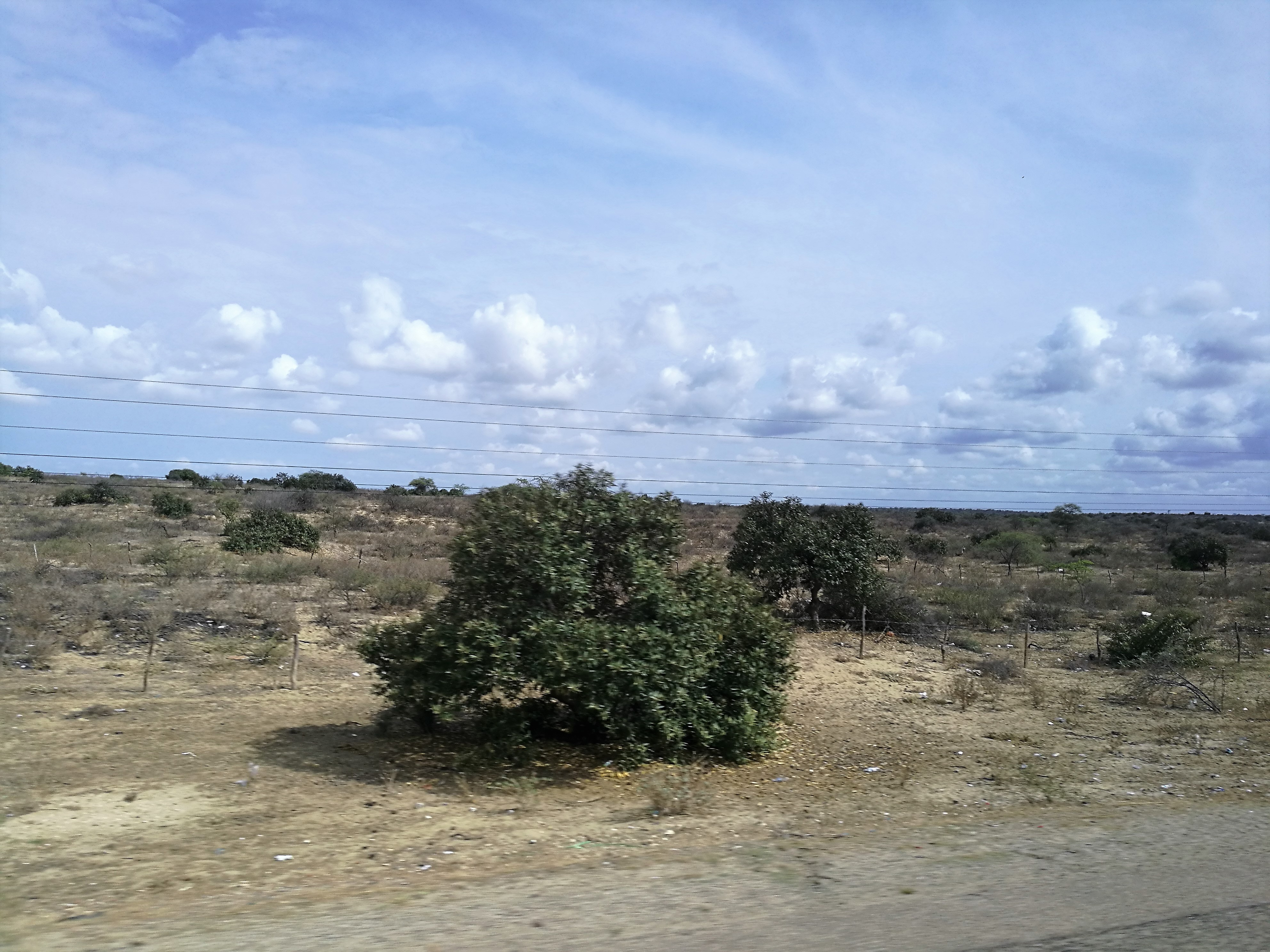 Desert al districte de Castilla des de la Panamericana Norte